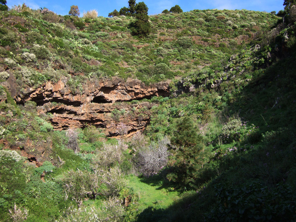 Cueva de Buracas